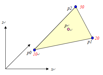 要素面内の補間